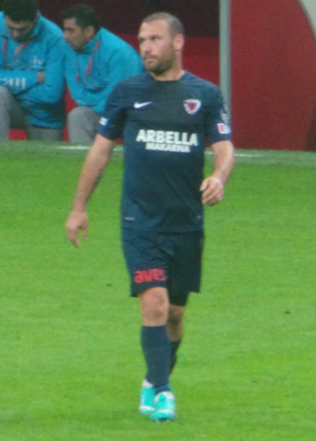 Serkan Balcı MİY